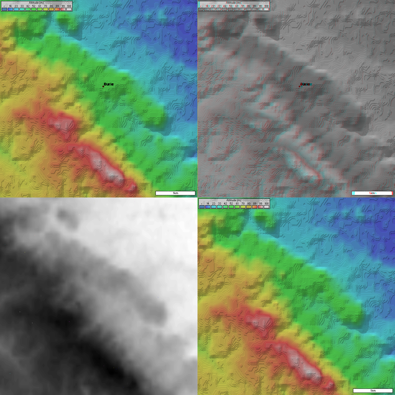 4 images topographique (5 km de coté) de Burie prisent par la mission SRTM. Image topographique + position des villes image topographique en relief + position des villes image topographique en niveau de gris (utile pour displacement map dans les logiciel 3D) Image topographique sans les villes Générée par le logiciel Radiomobile à partir des données domaine public de la mission SRTM de la NASA.